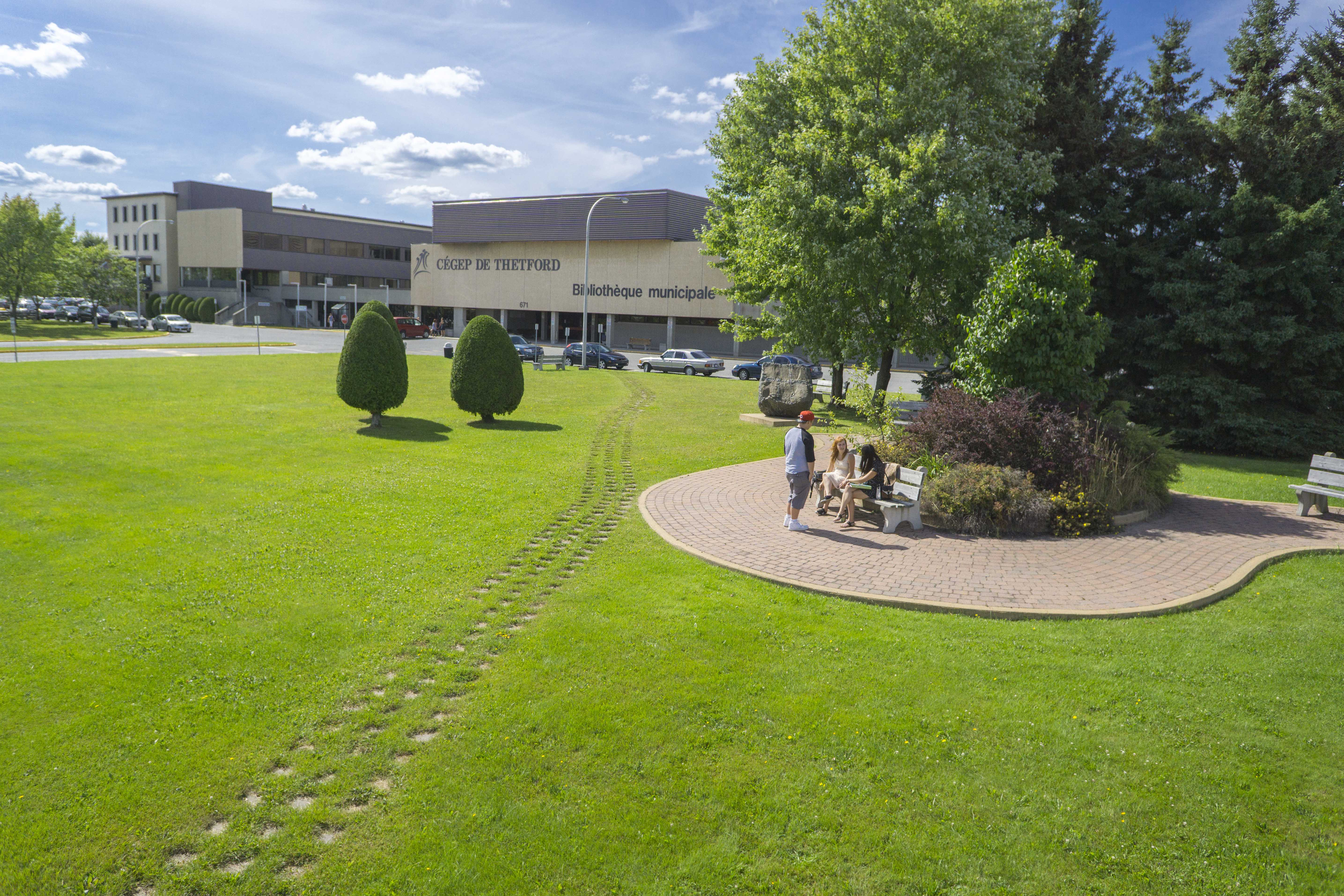 Le Cégep est une institution majeure et un joueur important dans l’ensemble Chaudière-Appalaches. La qualité de la formation et de l’encadrement qui y sont offerts a, depuis très longtemps, contribué à sa renommée. L'institution est également reconnu pour son accueil chaleureux et très personnalisé. Les étudiants y trouvent tout le soutien nécessaire à la réussite de leurs études, ce qui se reflète à travers les résultats scolaires de la clientèle étudiante. Il offre également une riche palette d’activités socioculturelles et sportives qui bénéficient d’équipements modernes et d’installations de premier ordre. En août 2014, le Cégep de Thetford a officiellement ouvert son Campus collégial à Lotbinière dans le but d’offrir à la population étudiante de Lotbinière un environnement dynamique, propice aux études, à proximité de chez eux. De plus, deux centres de recherche sont attachés au Cégep. L’un se consacre à la minéralurgie et à la plasturgie, tandis que l’autre explore l’oléochimie industrielle. Leur réputation n’est plus à faire et ces deux centres de recherche contribuent, de manière très significative, au rayonnement du Cégep de Thetford. Enfin, le Cégep s’engage activement dans le développement régional à travers une foule d’initiatives et de projets.